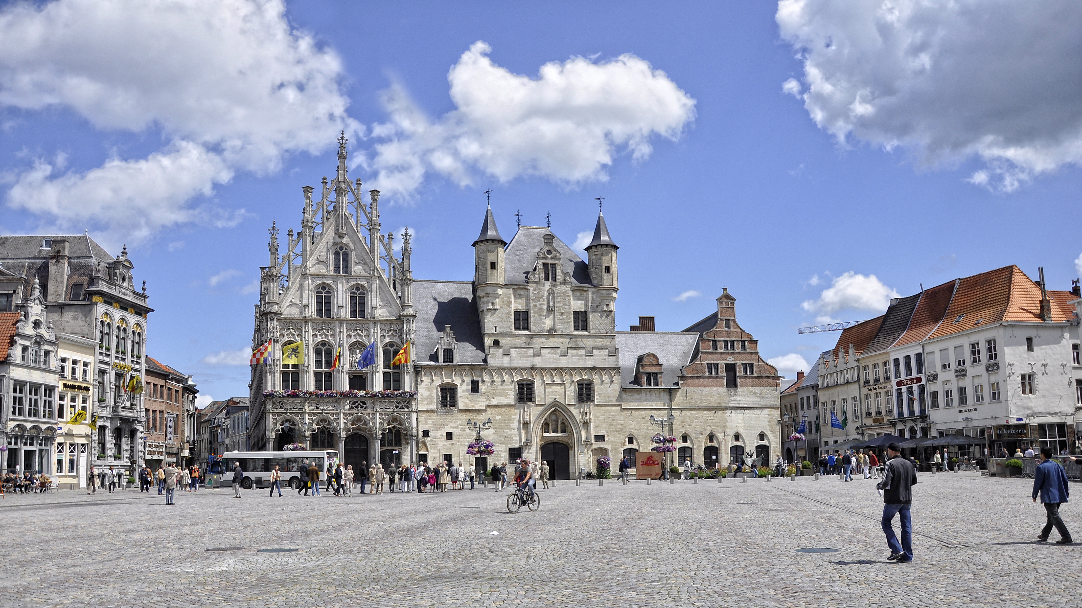 De Grote Markt en het stadhuis van Mechelen, België